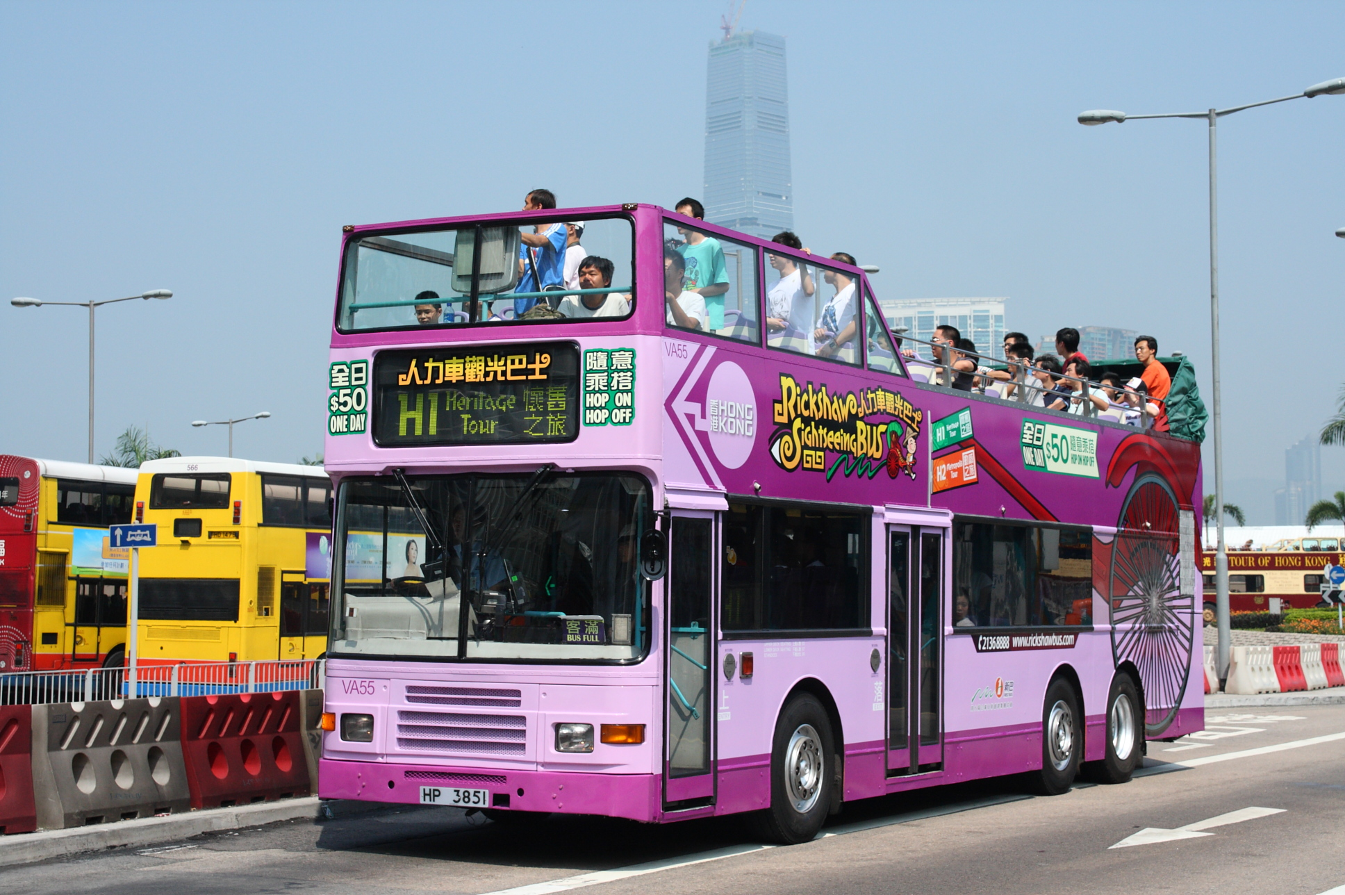 2009年10月18日，新巴「人力車觀光巴士」路線H1「懷舊之旅」啟航，仿傳統人力車裝飾的開頂巴士正由起點中環碼頭出發。